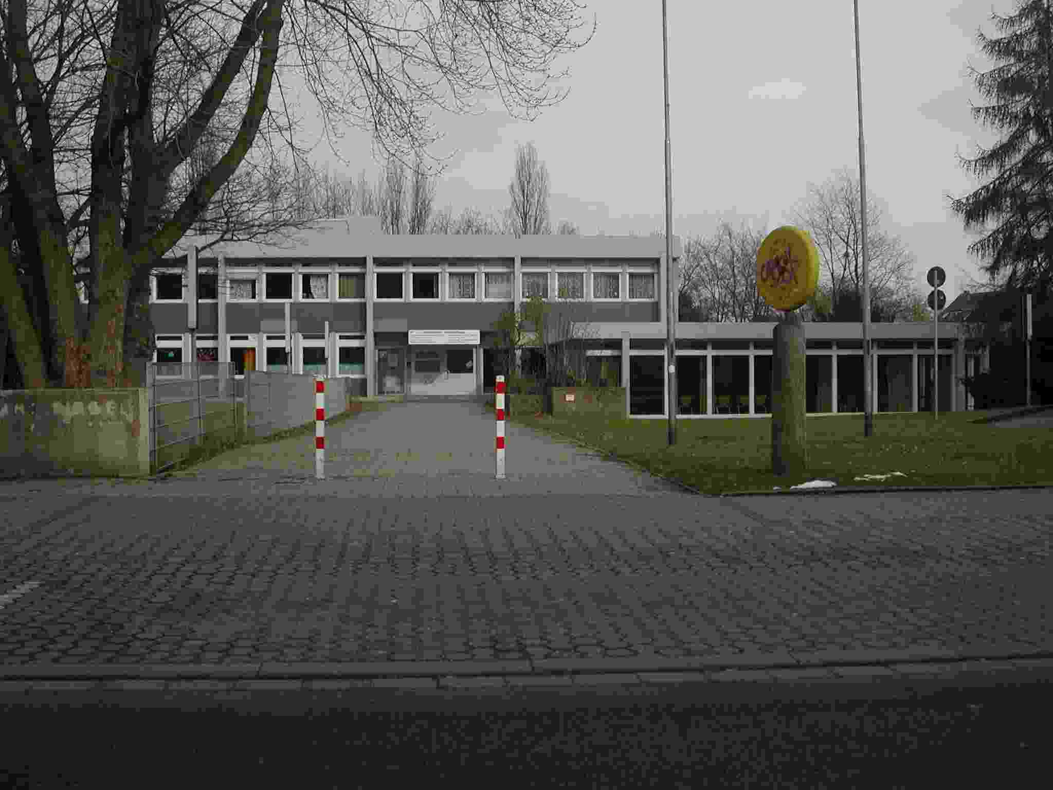 Roelsdorf02